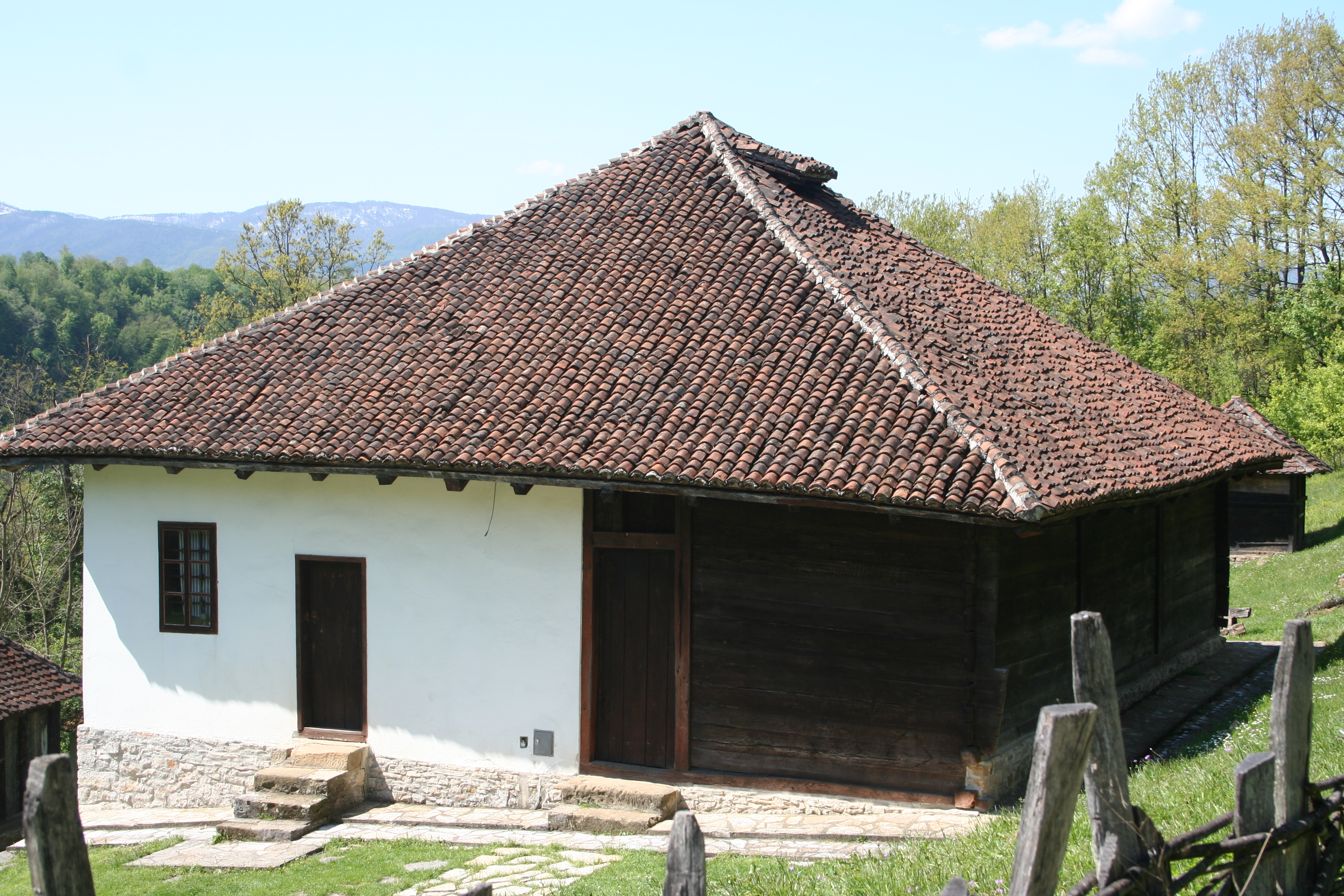 Rodna kuća vojvode Živojna Mišića u Struganiku